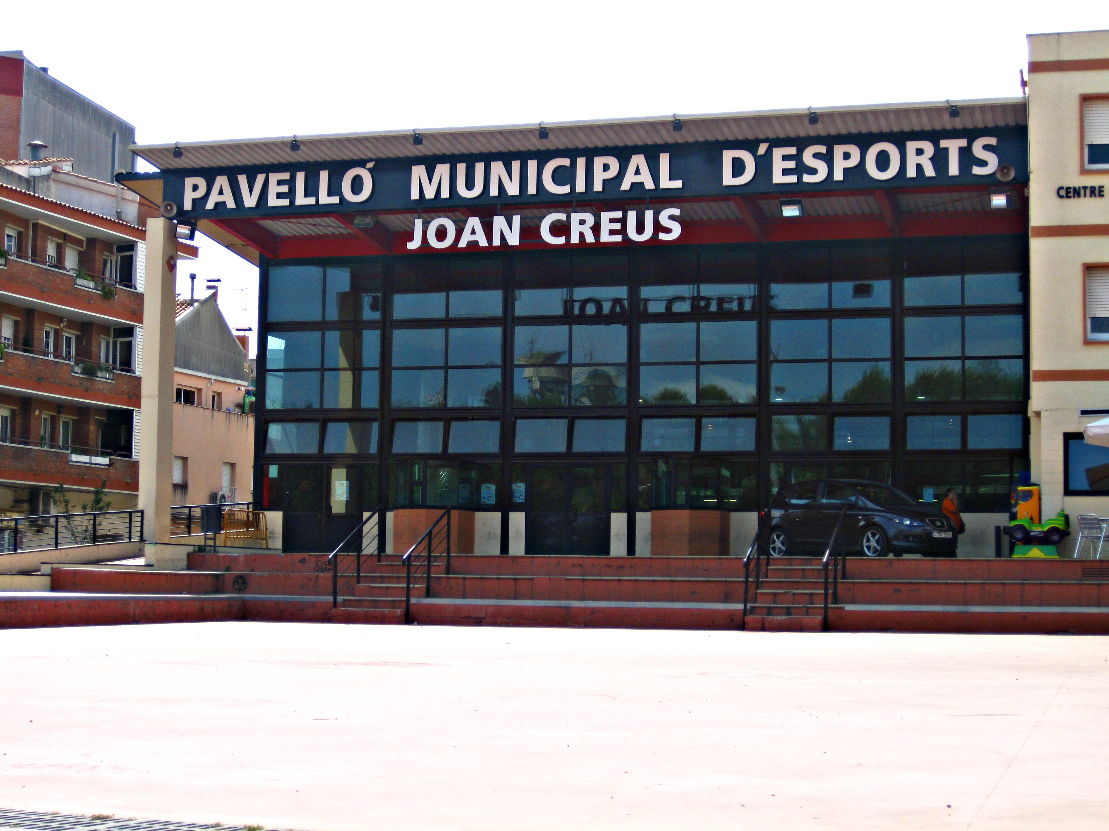 Pabellón Municipal deportivo Joan Creus de Ripollet, provincia de Barcelona.